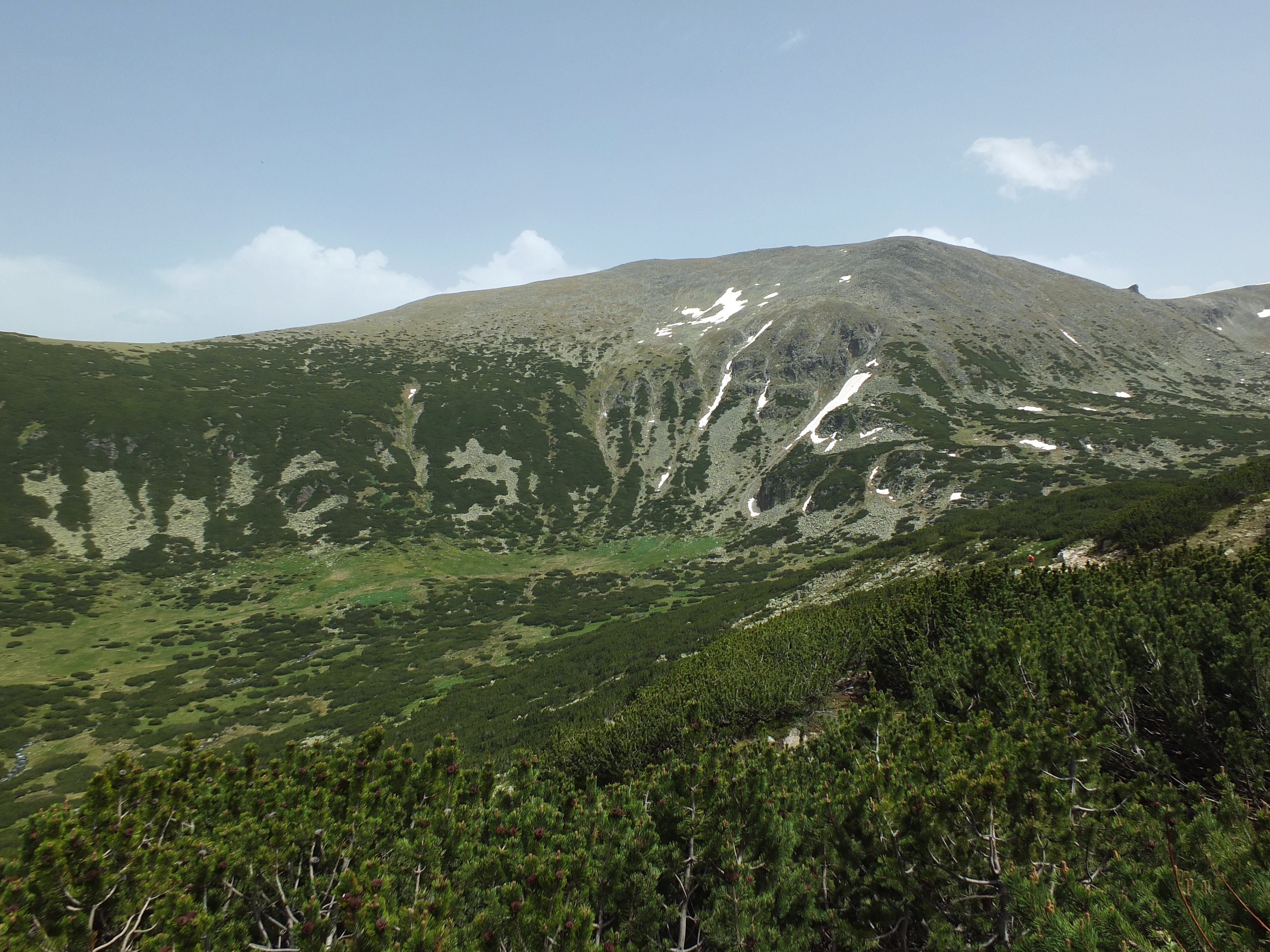 Рила, Рила Връх Дено с долината на р. Мусаленска Бистрица